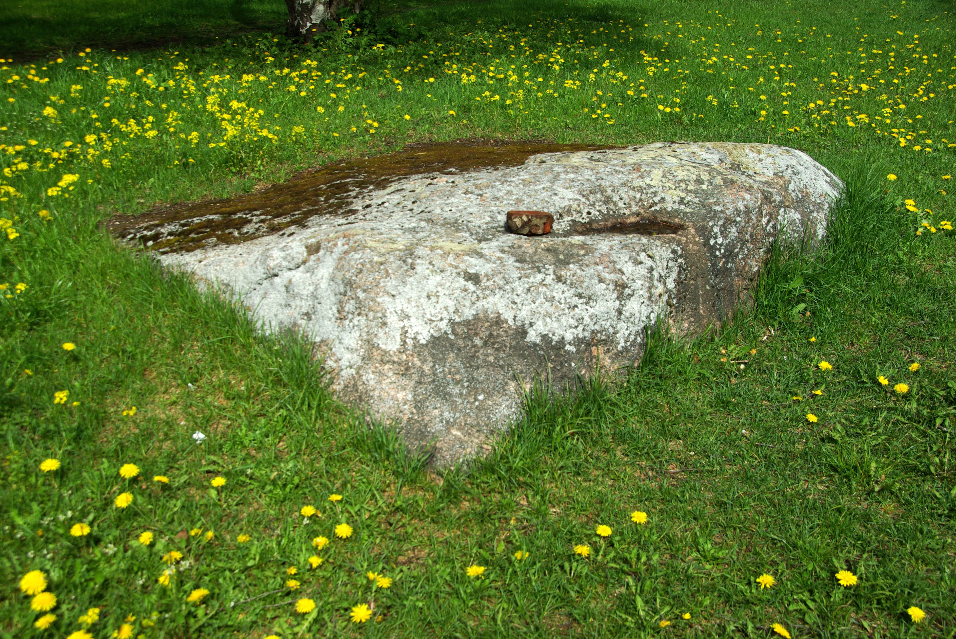 Jäämäekivi